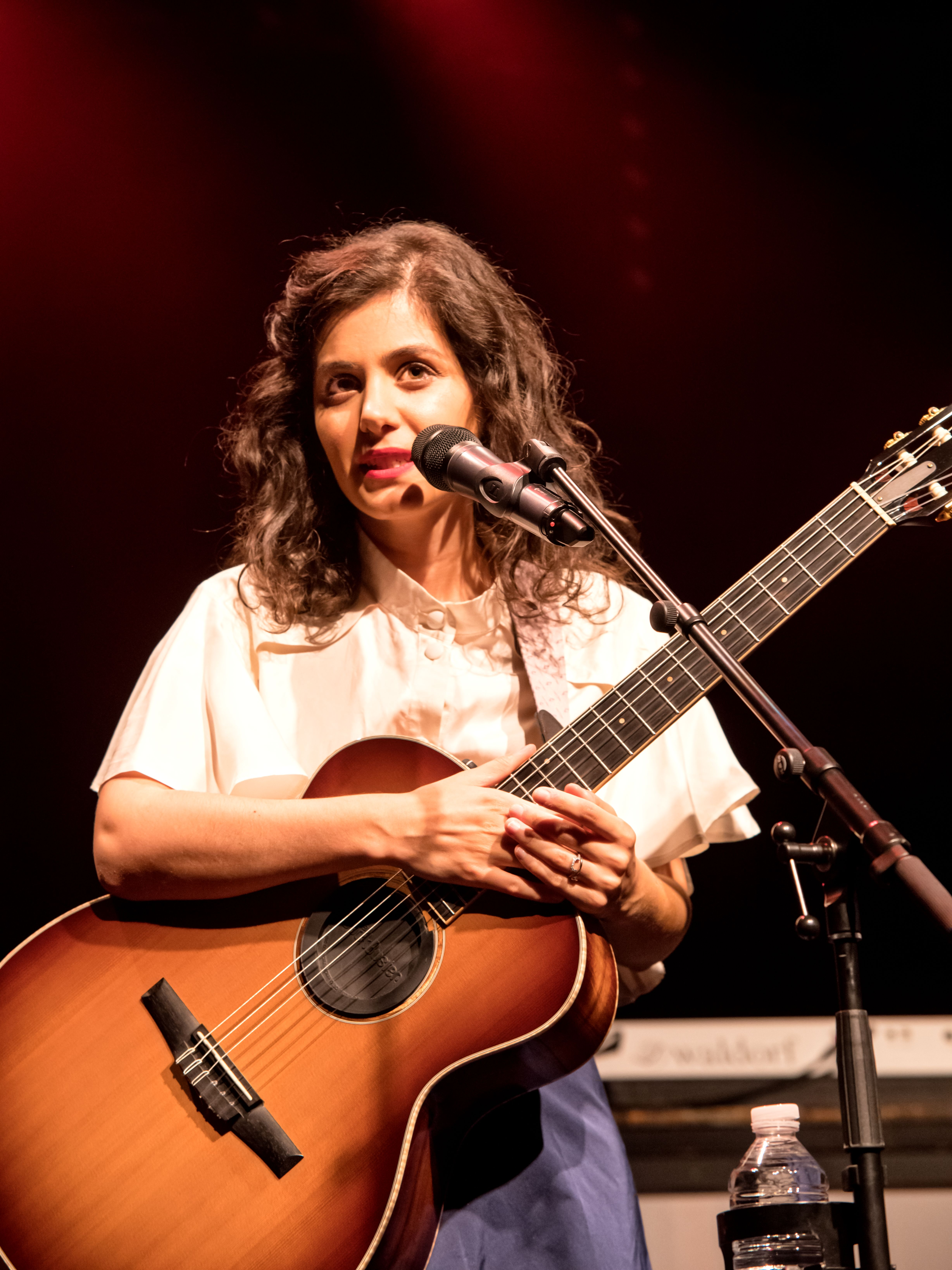 Bilder vom Zelt Musik Festival 2016 in Freiburg im Breisgau Katie Melua